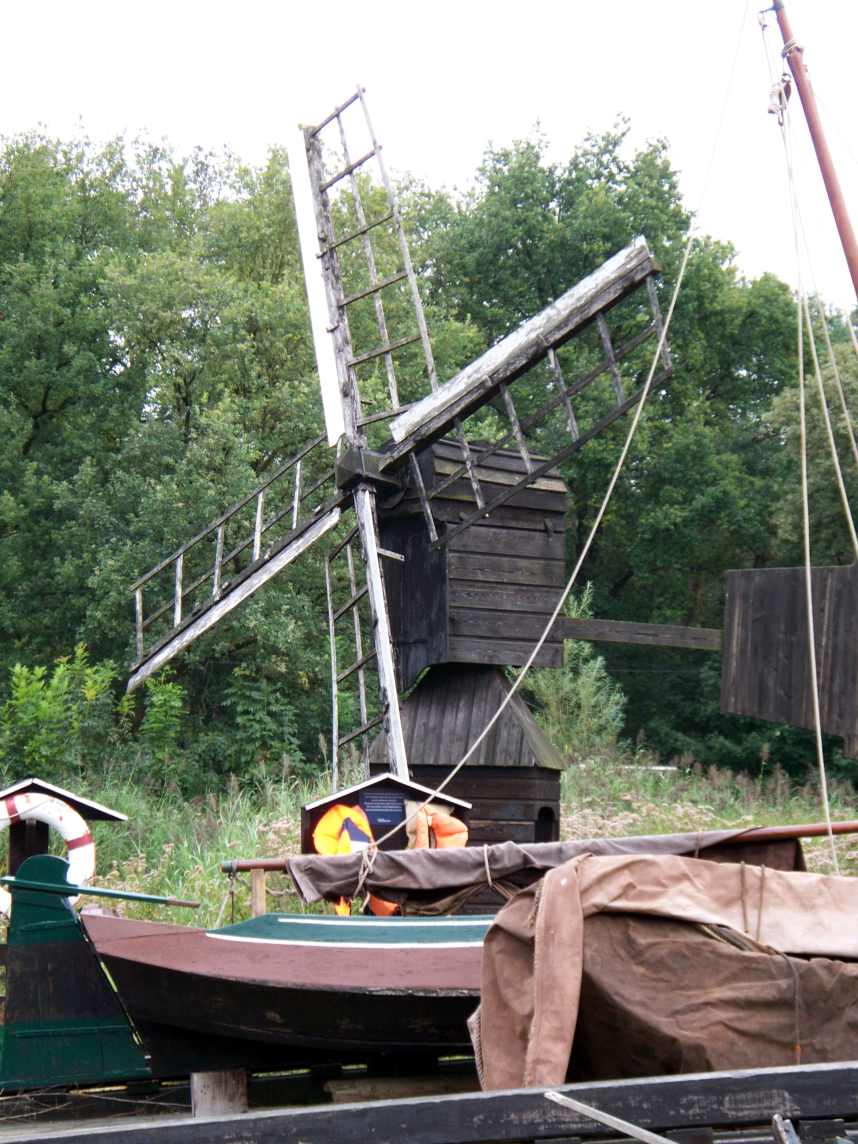 Weidemolen in Openluchtmuseum Arnhem